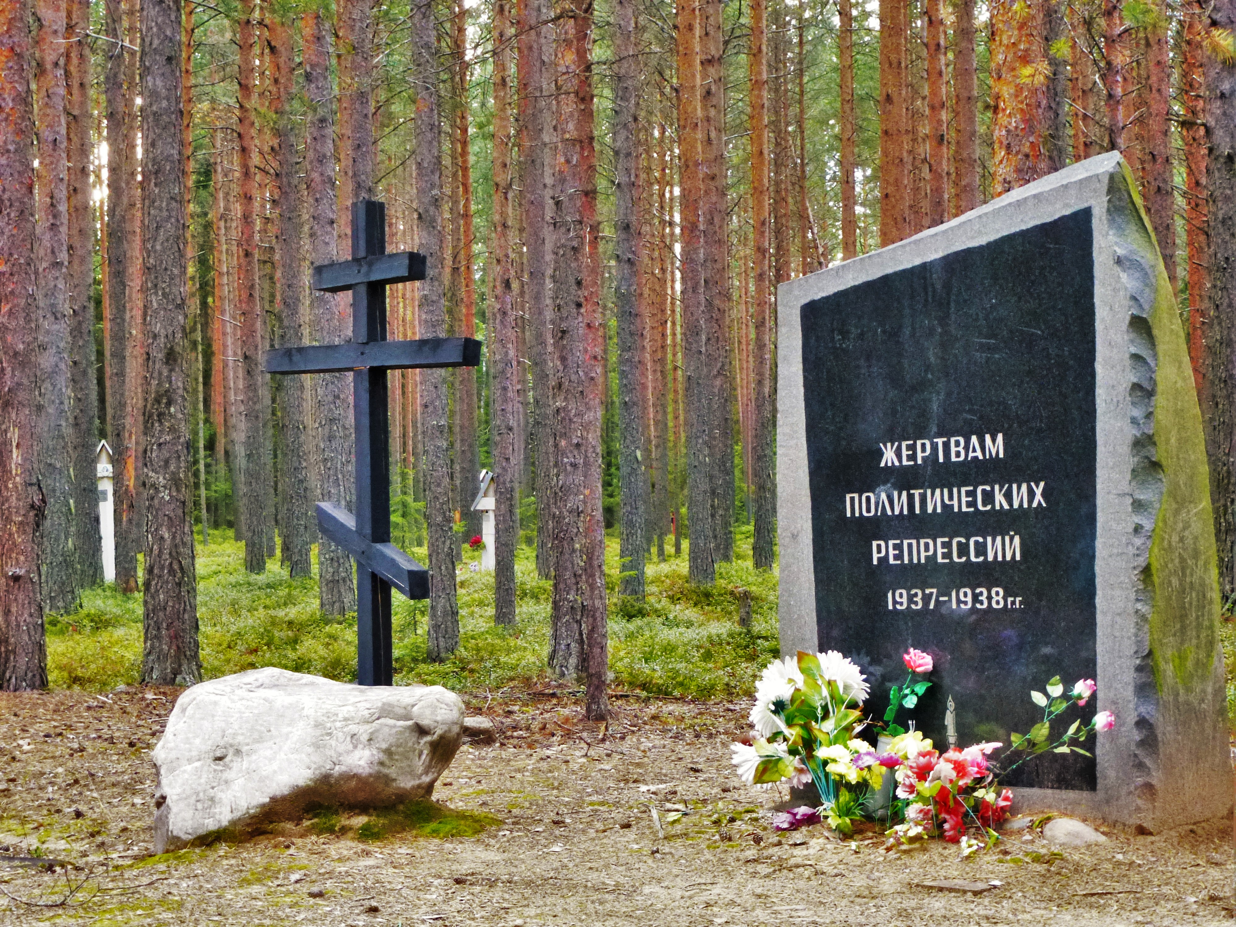 Памятник в местечке "Красный Бор" под Петрозаводском. Открыт в 1998 году.